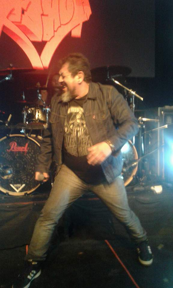 La banda argentina de thrash Horcas, dando un concierto en vivo.